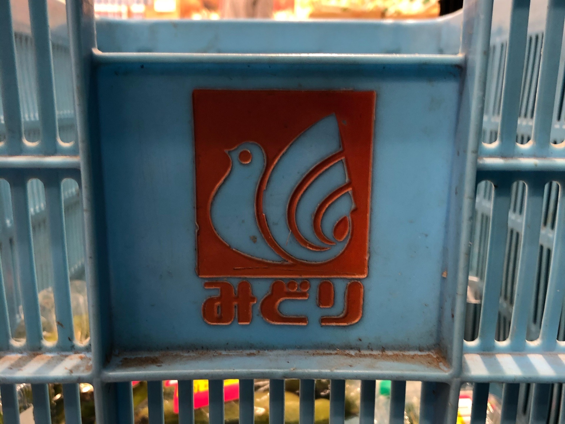 スーパーみどりのロゴマーク。現在も、ザビッグの旧みどり系店舗では、みどりのロゴマークの入ったケースを使用している